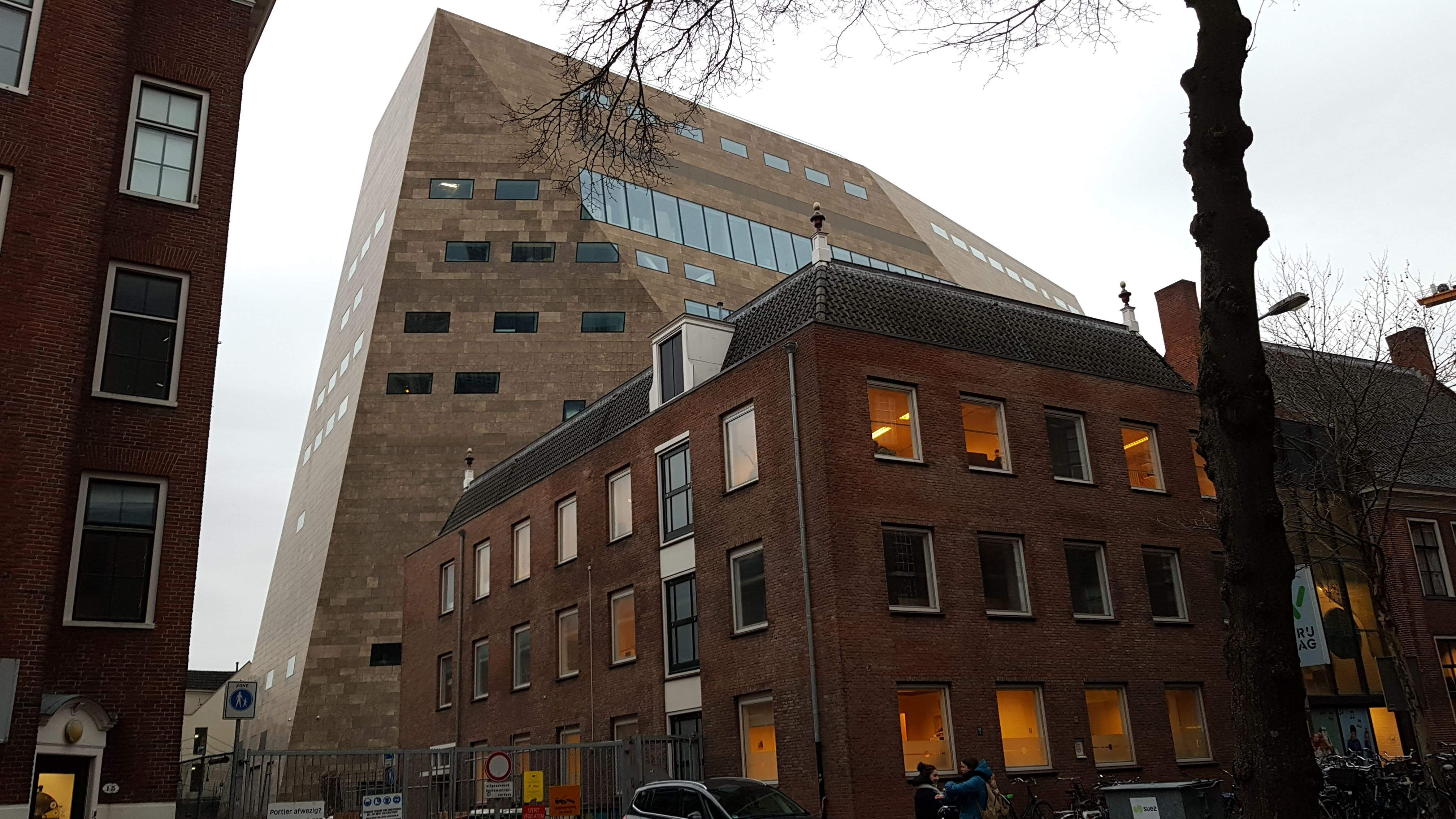 Groningen Forum vanaf de Sint Jansstraat op 06-03-2019